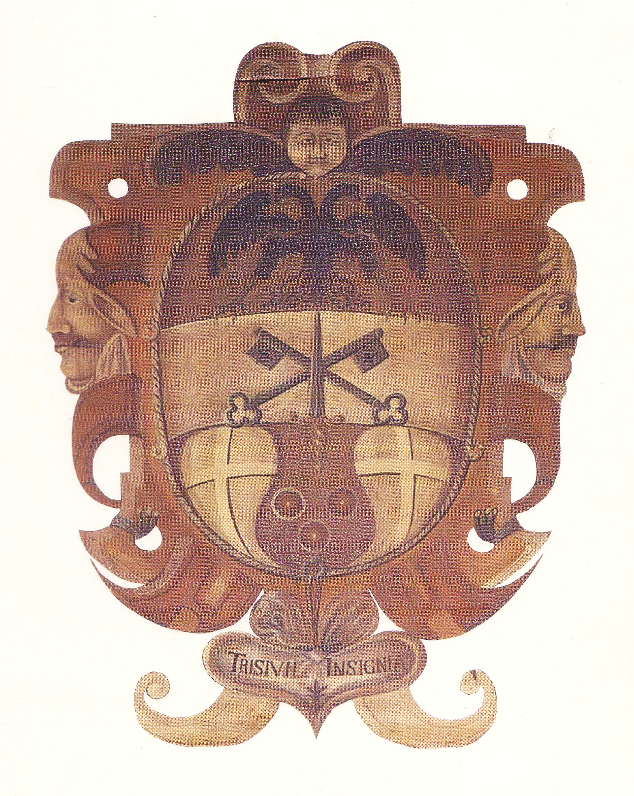 Tresivo-Stemma (ecusson de la ville de Treviso)